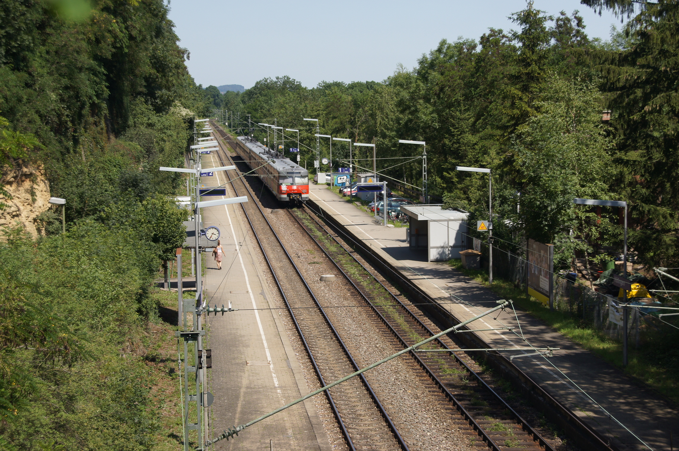 Haltepunkt Höfingen